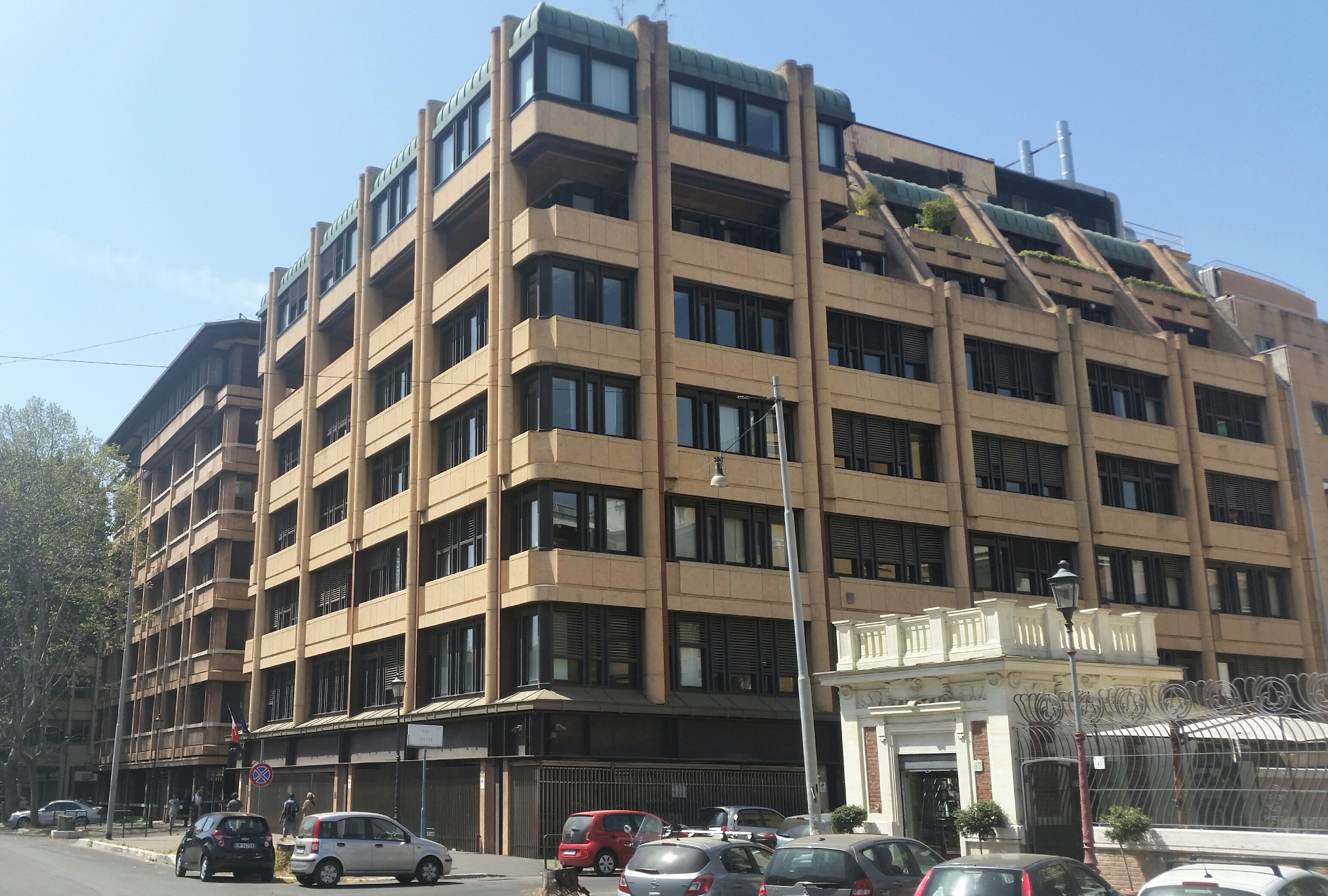 Sede Telecom Italia - Roma, Corso d'Italia 41